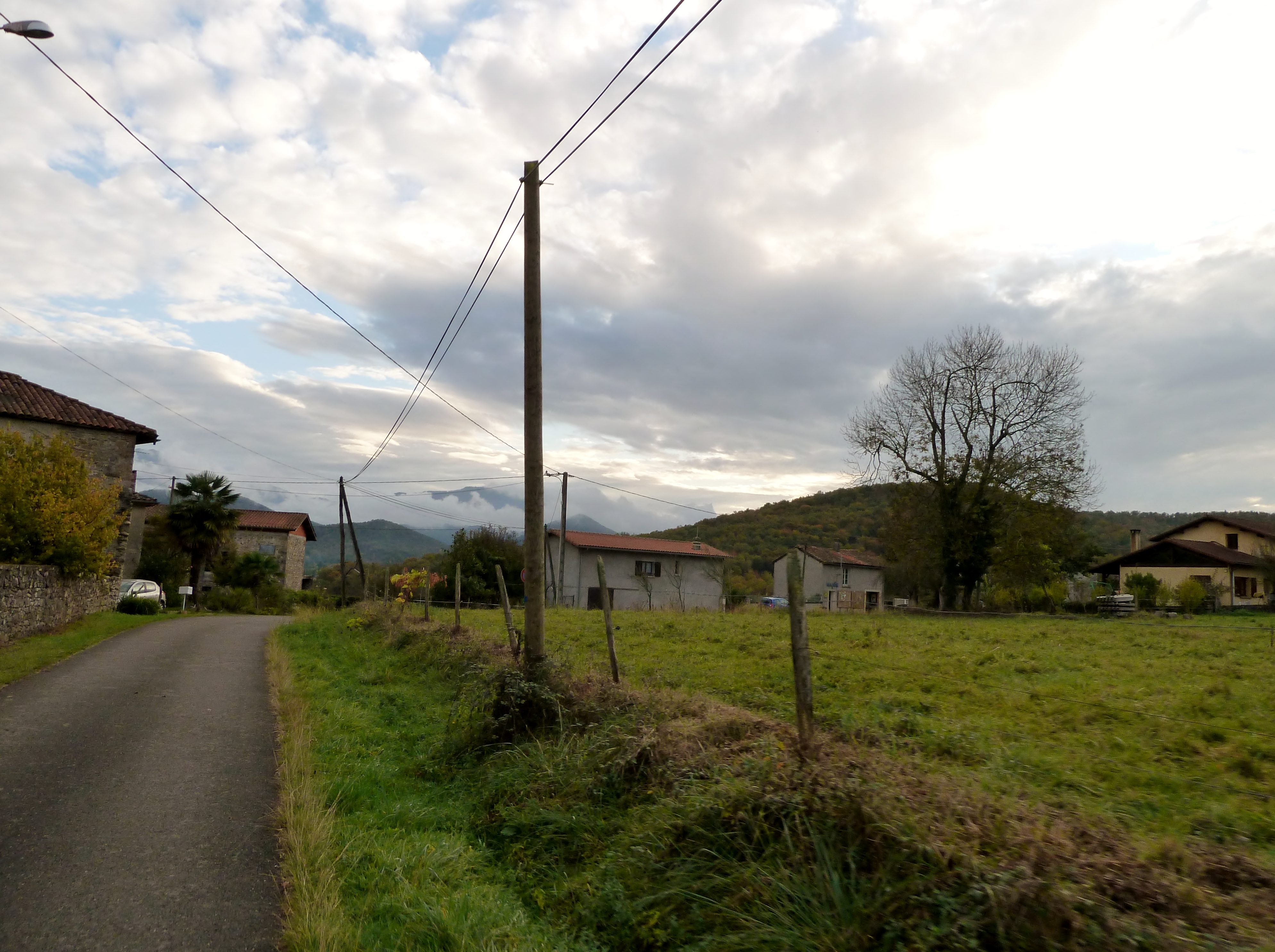 Rieucazé